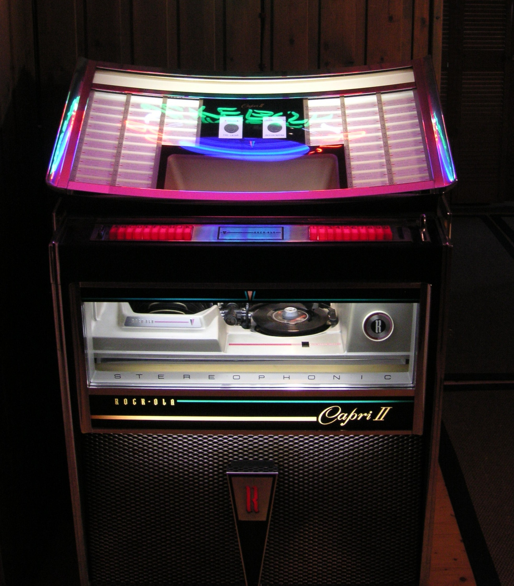 Rock-Ola djukebox Capri II från 1965